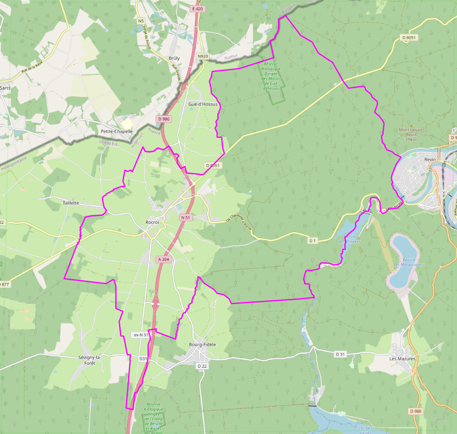 carte réalisée sur umap This map may be incomplete, and may contain errors. Don't rely solely on it for navigation.